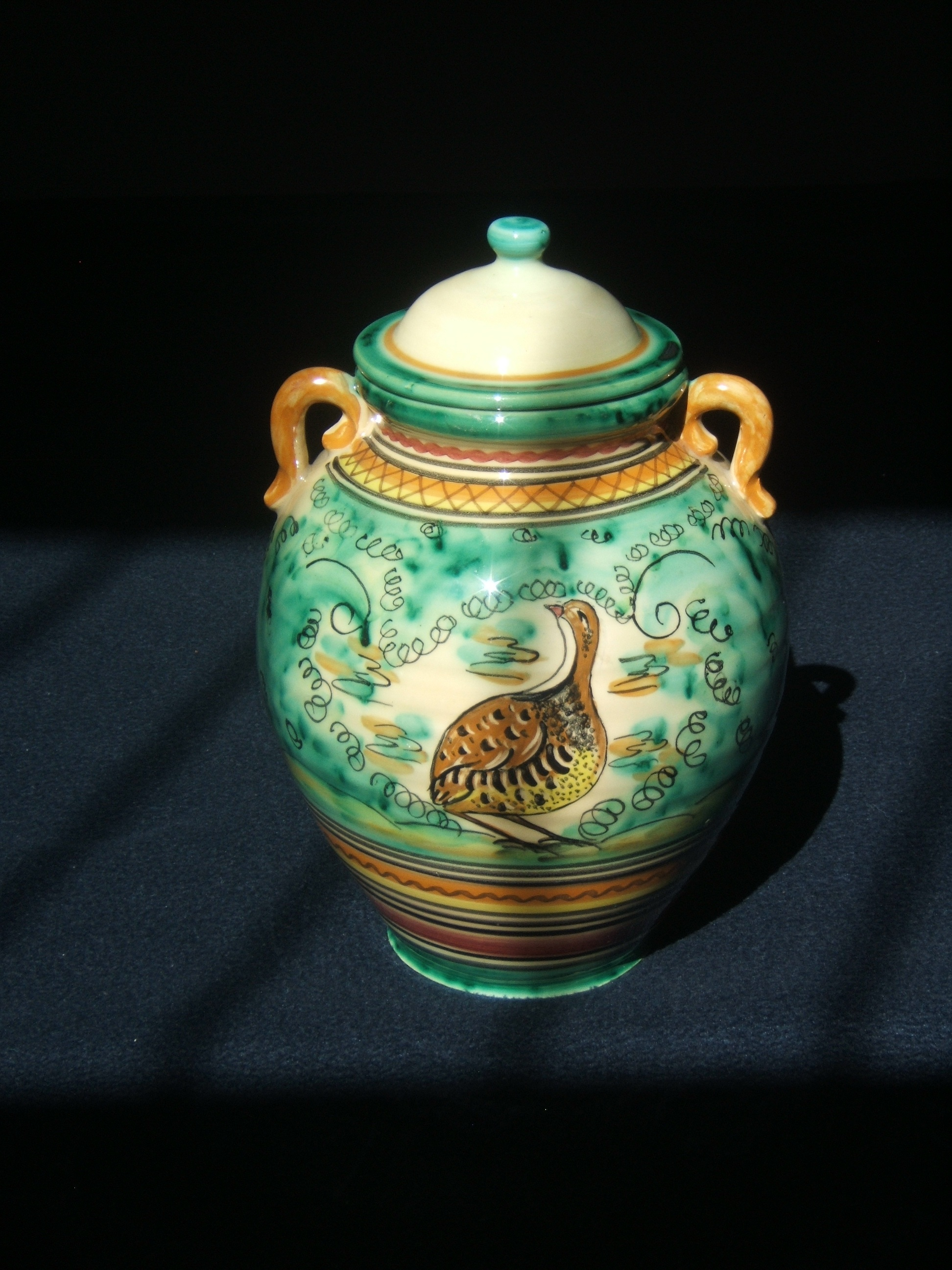 Orza de loza esmaltada con tapa. Serie esmeralda (escenas policromas con animales) decorada con una perdiz. Alfar tradicional de El Puente del Arzobispo. Colección Fra.